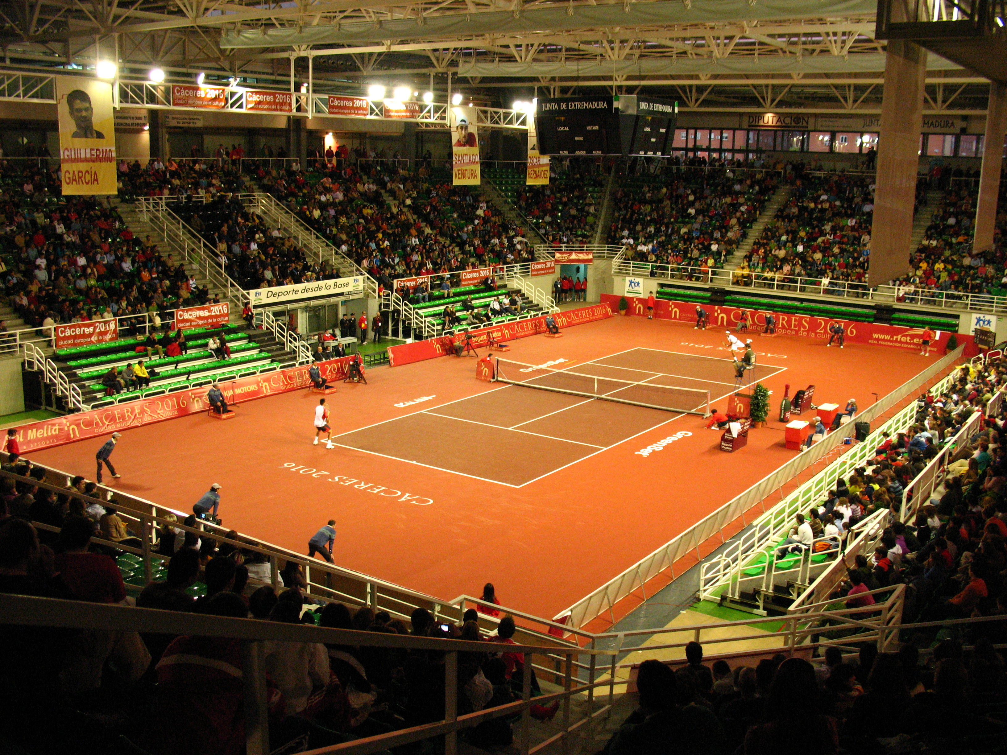 Semifinales Master Nacional de Tenis 2007 en el Pabellón Multiusos Ciudad de Cáceres.